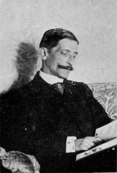 Gaston Moch L. K., prezidanto de "Esperanto Pacifista", Neuilly s/ Seine.